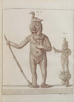 Abbildung eines Prillwitzer Idols. Aus: Die gottesdienstlichen Alterthümer der Obotriten aus dem Tempel zu Rhetra am Tollenzer-See Nach den Originalien auf das genaueste gemahlet, und in Kupferstichen, nebst Hrn. Andreas Gottlieb Maschens Herzogl. Mecklenb. Strelitzischen Hofpredigers, Consistorial-Raths und Superintendentens Erläuterung derselben, herausgegeben von Daniel Wogen, Herzogl. Mecklenb. Strel. Hofmahler, Erschienen 1771